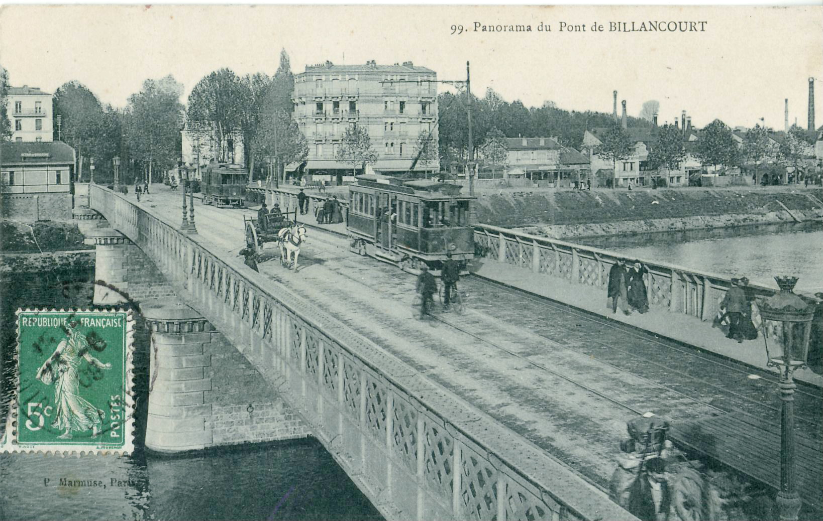 Carte postale ancienne éditée par Marmuse, n°99 : Panorama du Pont de Billancourt